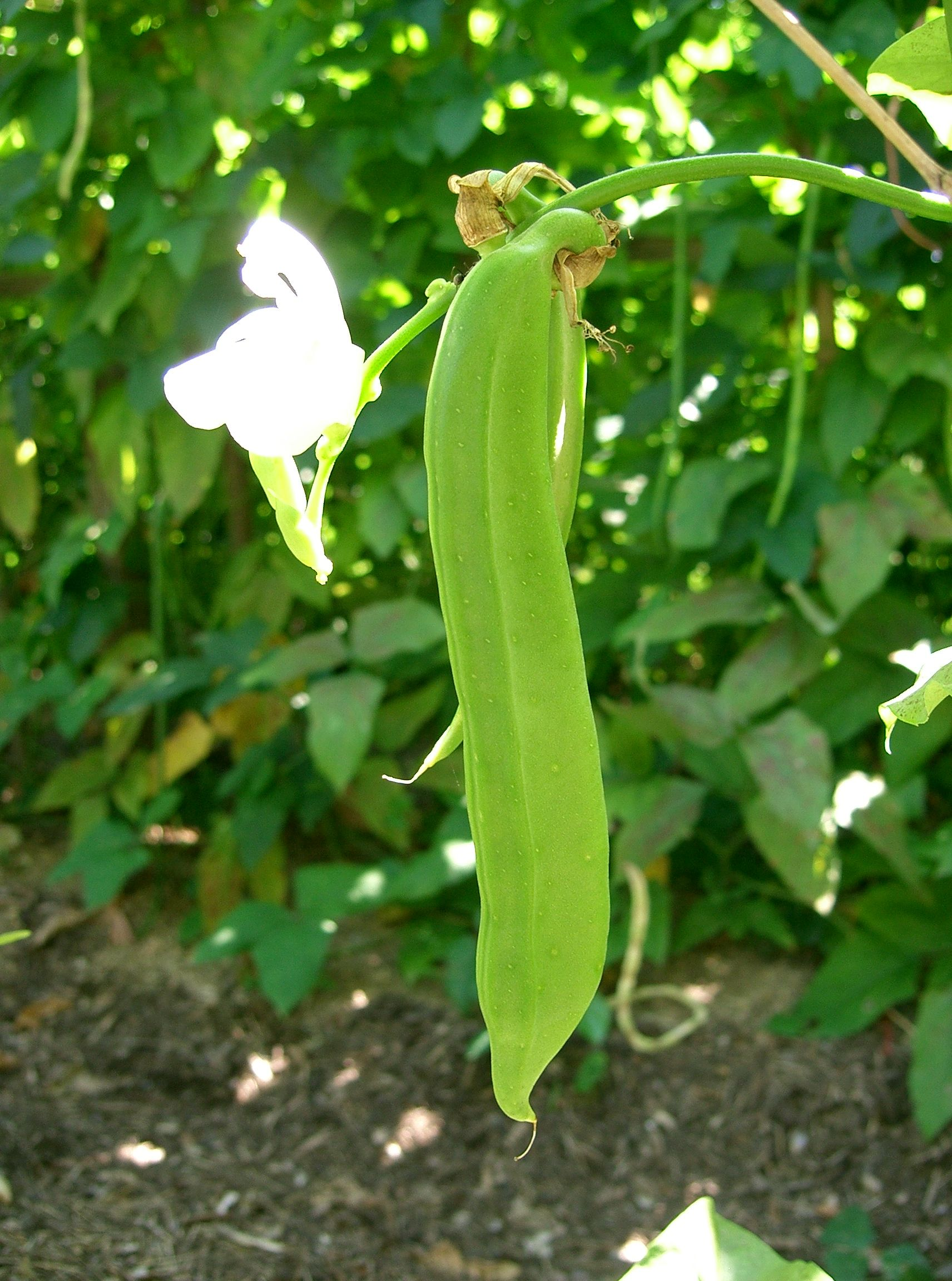 Canavalia gladiata